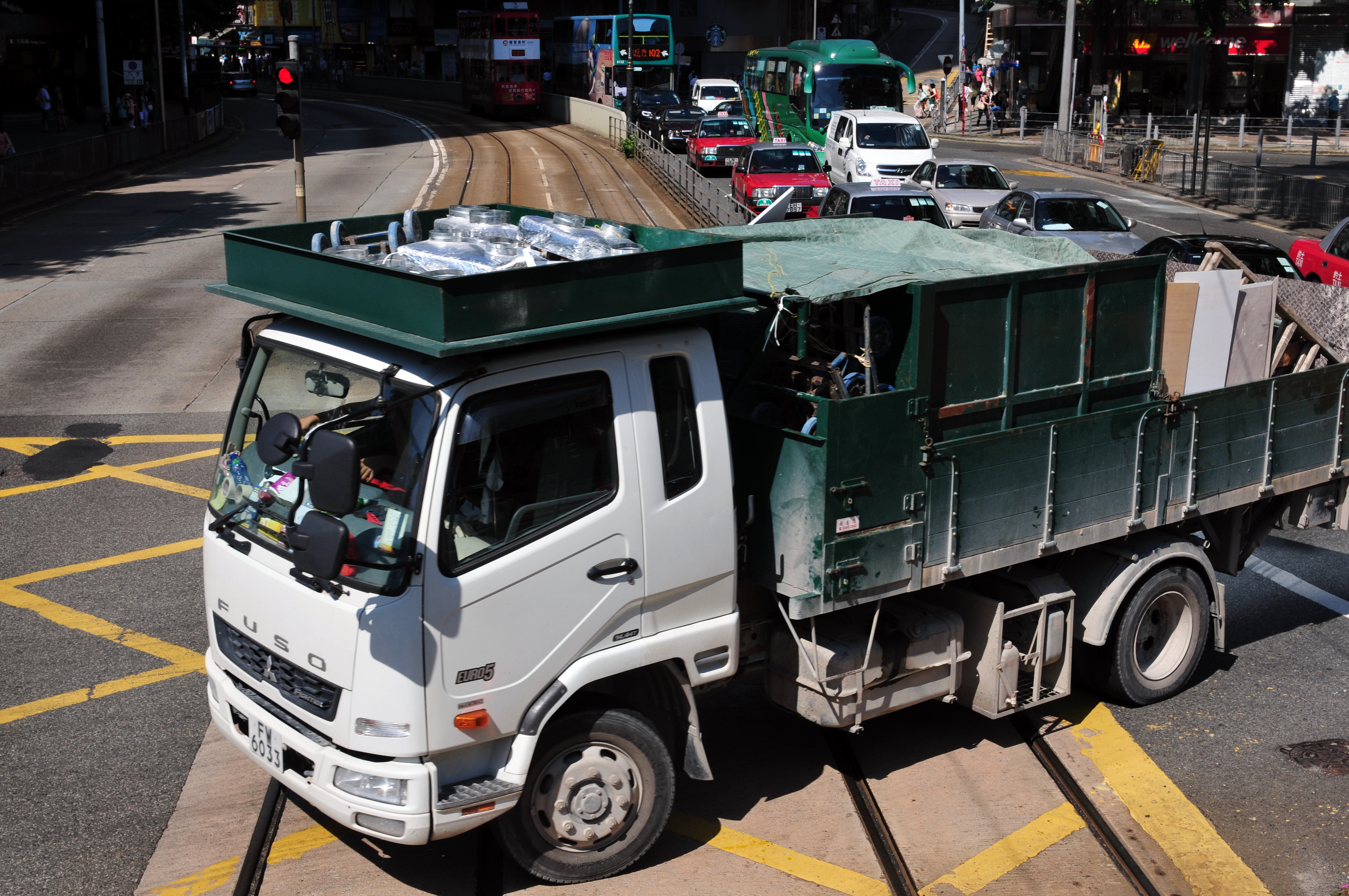 Wikimania 2013 Hongkong